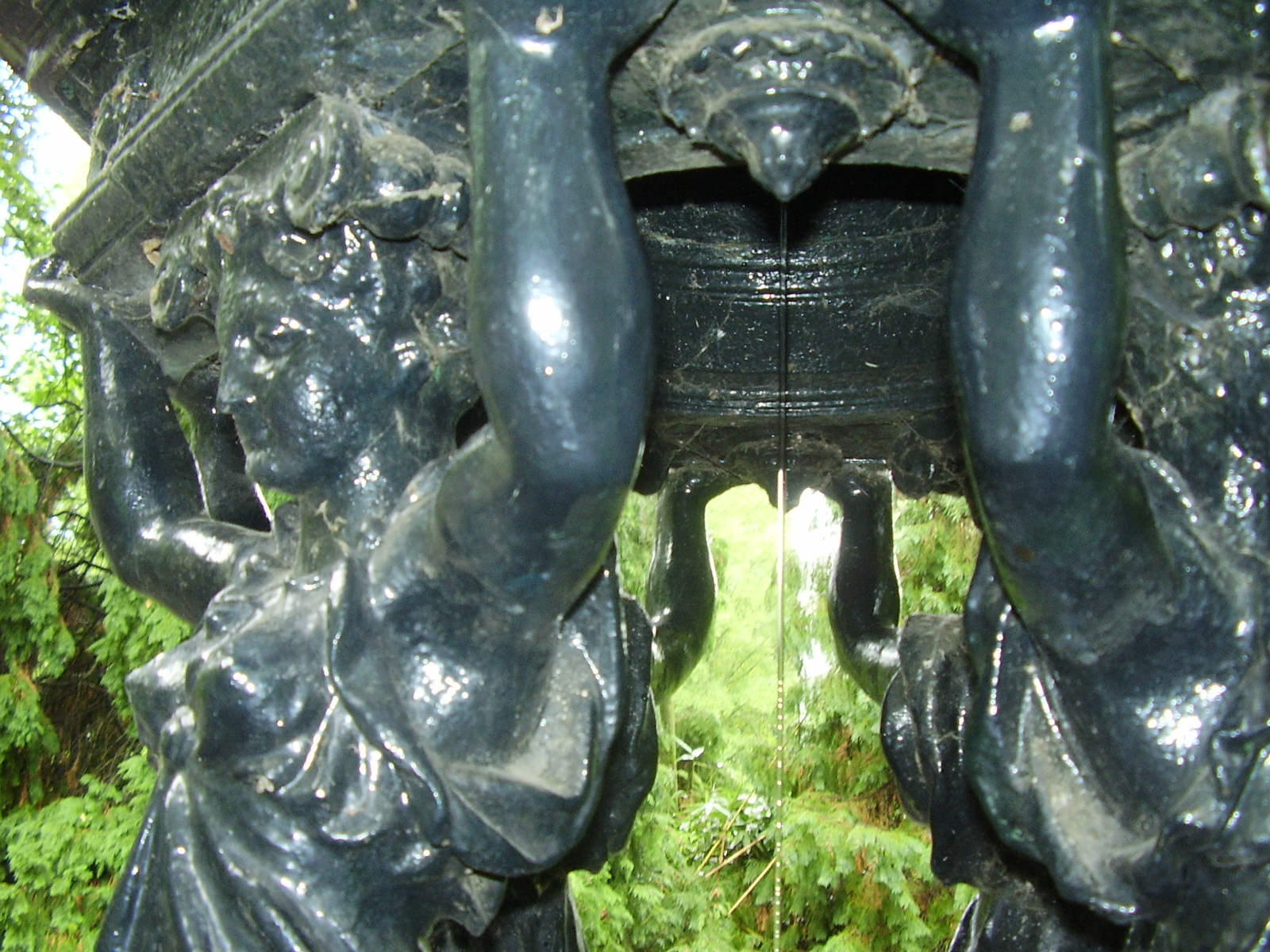 Font Wallace du Jardin des Plantes à Nantes.